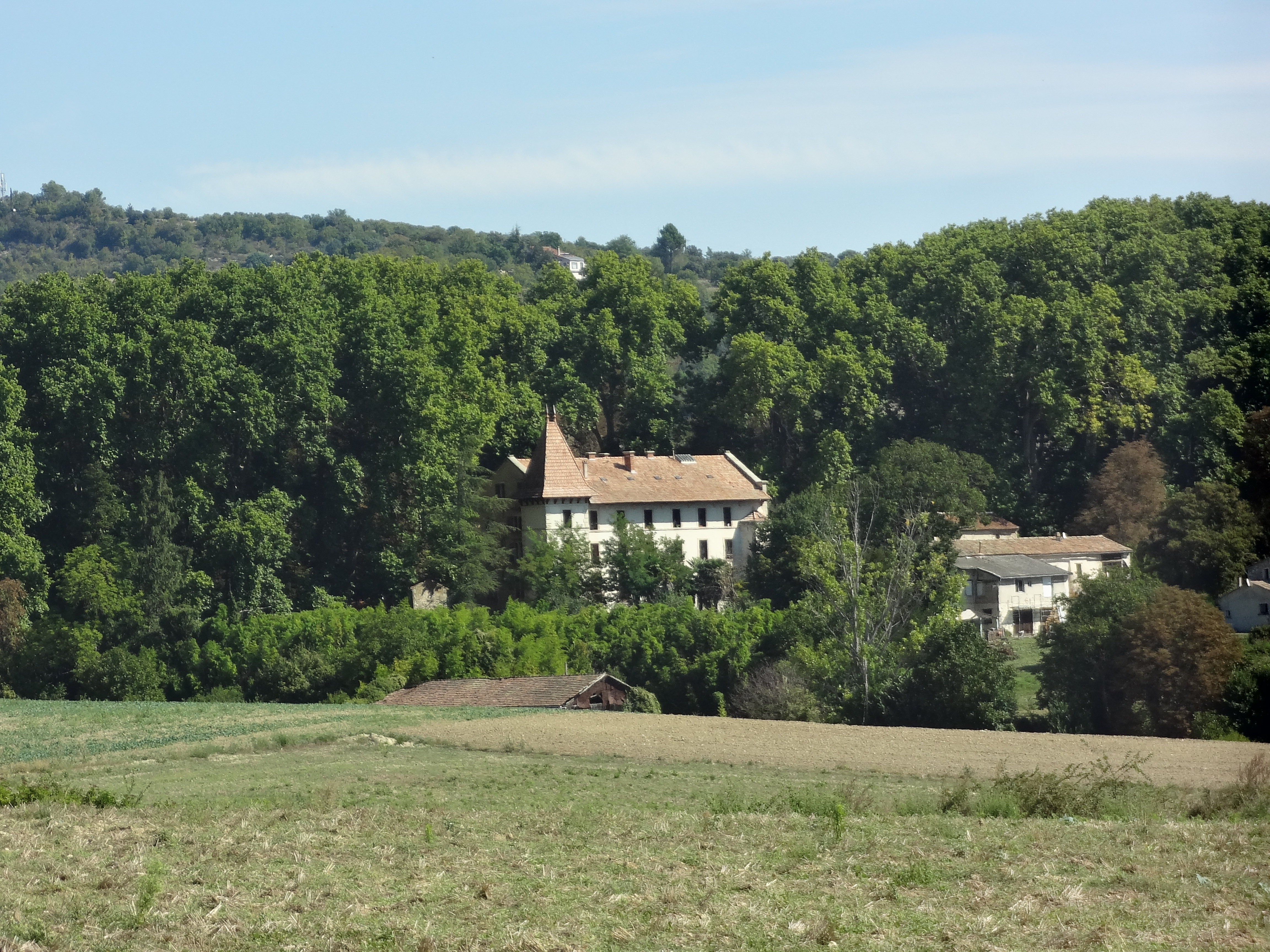 Château du Pinet à Reillanne, vu du sud-ouest (bord de chemin)